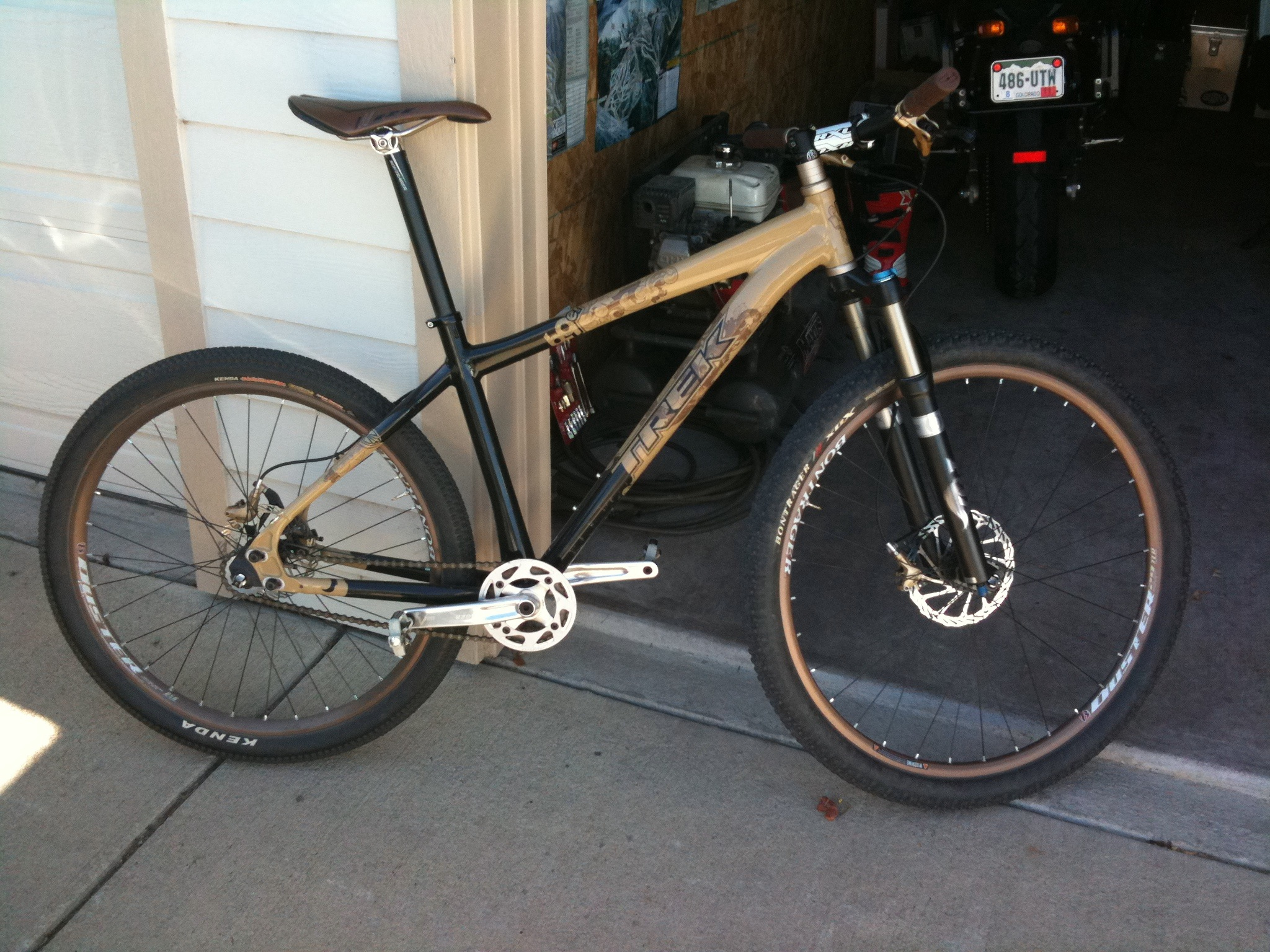 Trek 69er Single Speed [1]